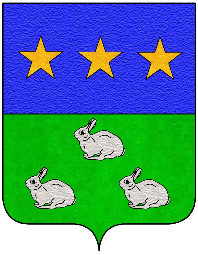 Stemma della famiglia Celini, appartenente al patriziato di Venezia.